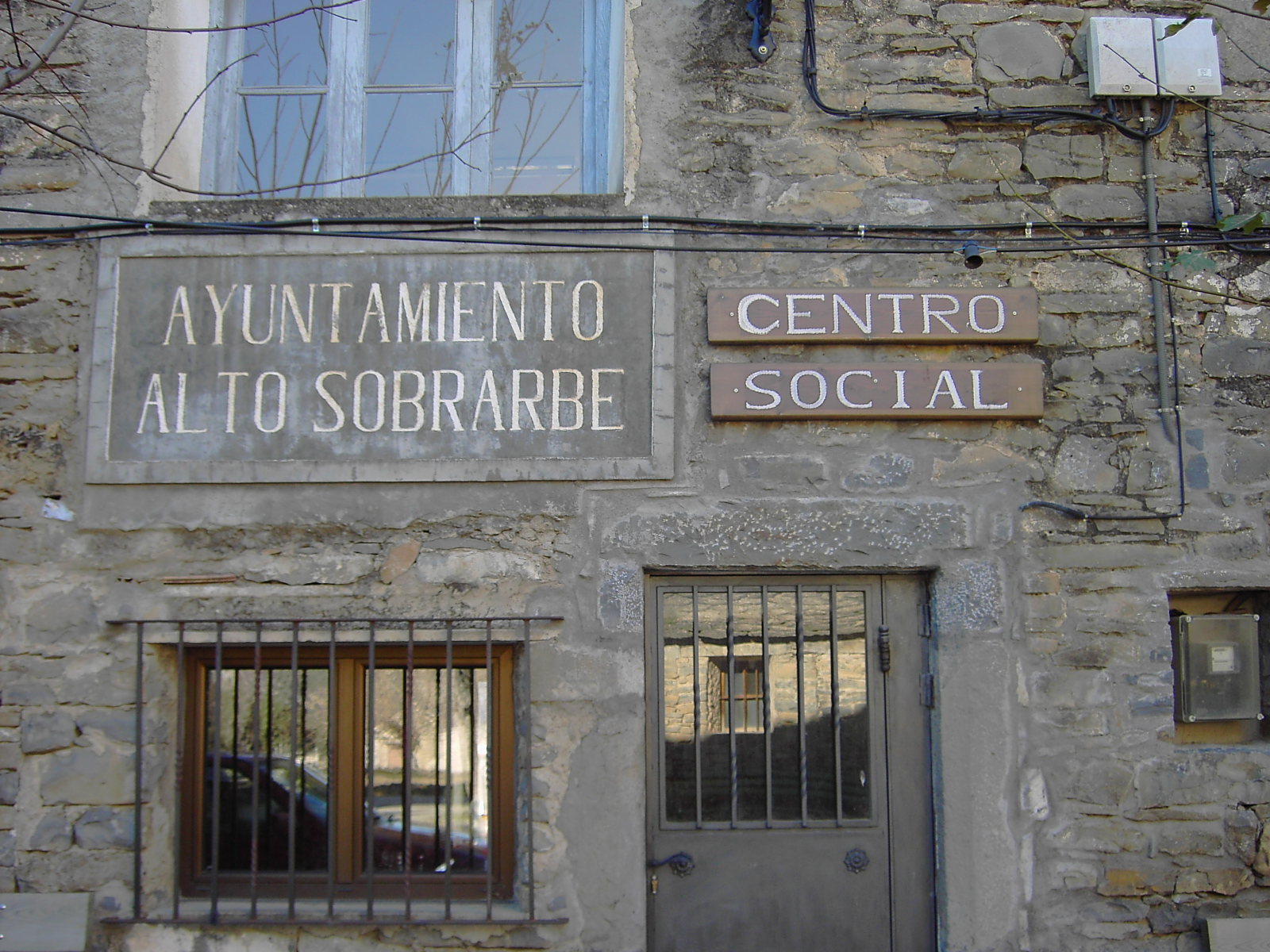 Antiguo ayuntamiento de Alto Sobrarbe (municipio hoy añadido a l'Aínsa-Sobrarbe) en Arcusa (Sobrarbe, Huesca)